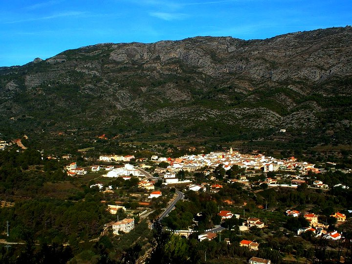 Benigembla és un poble valencià de la Vall de Pop i en la comarca de la Marina Alta.